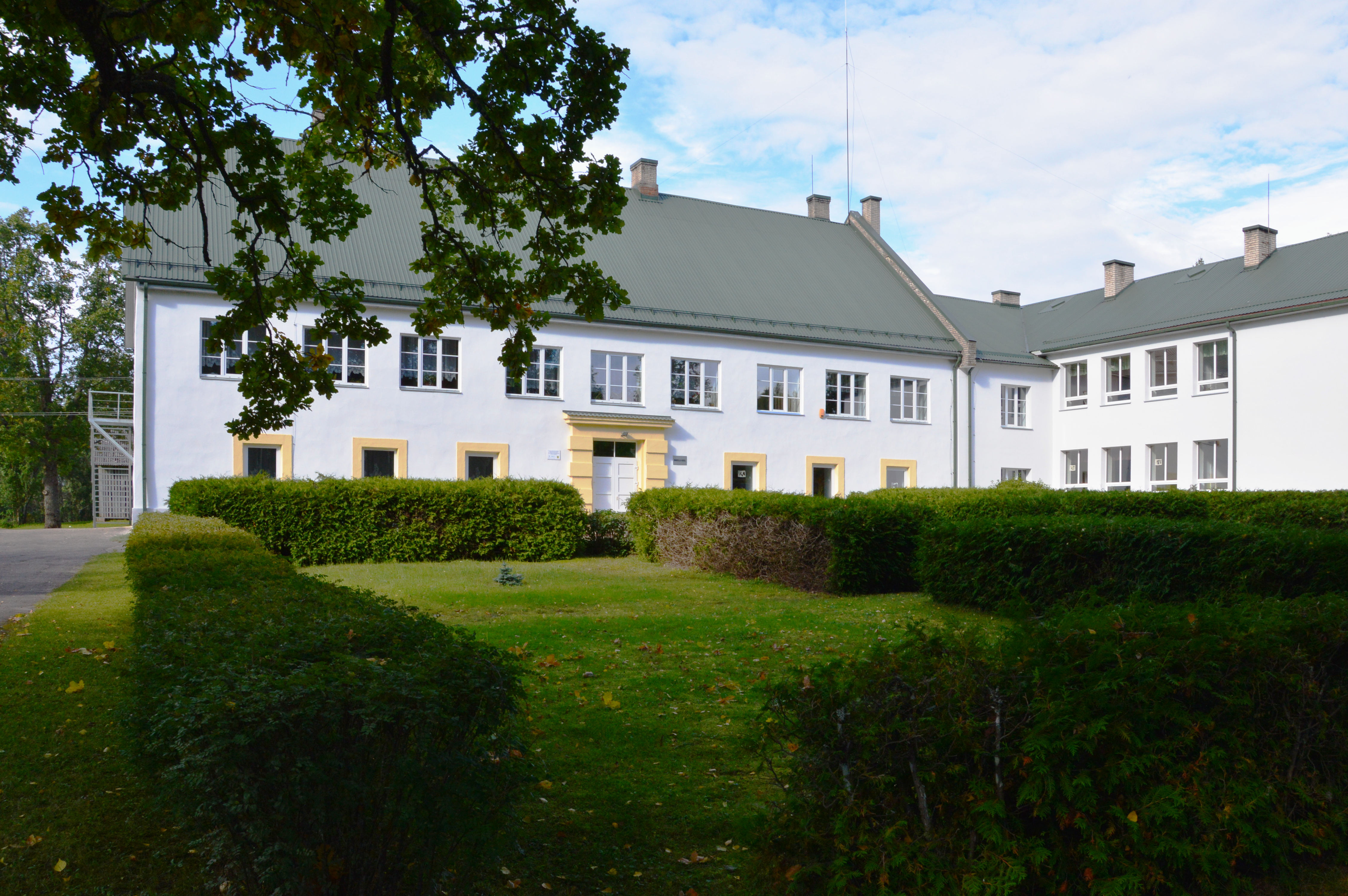 Hargla kool